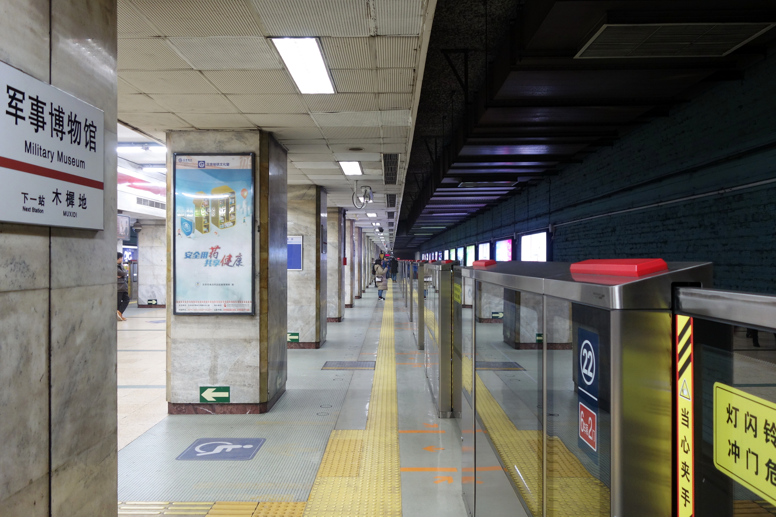 北京地铁1号线军事博物馆站站台。站台加装半高式安全门，2017年投入使用。